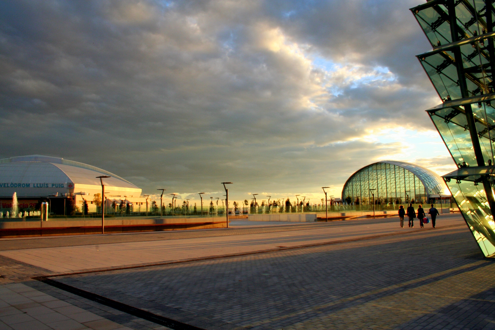 Benimamet - Atardecer de Invierno cerca del Velodromo Luis Puig y la Feria de Valencia